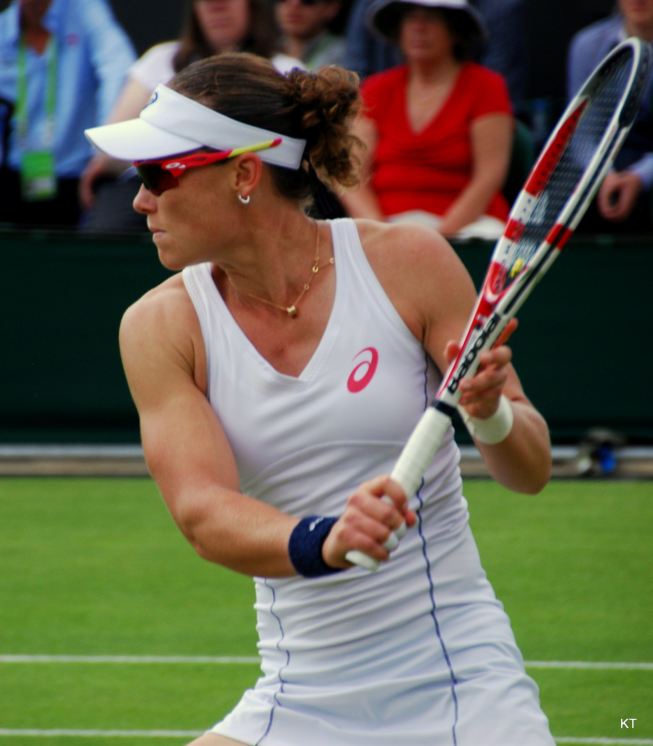 Sam Stosur